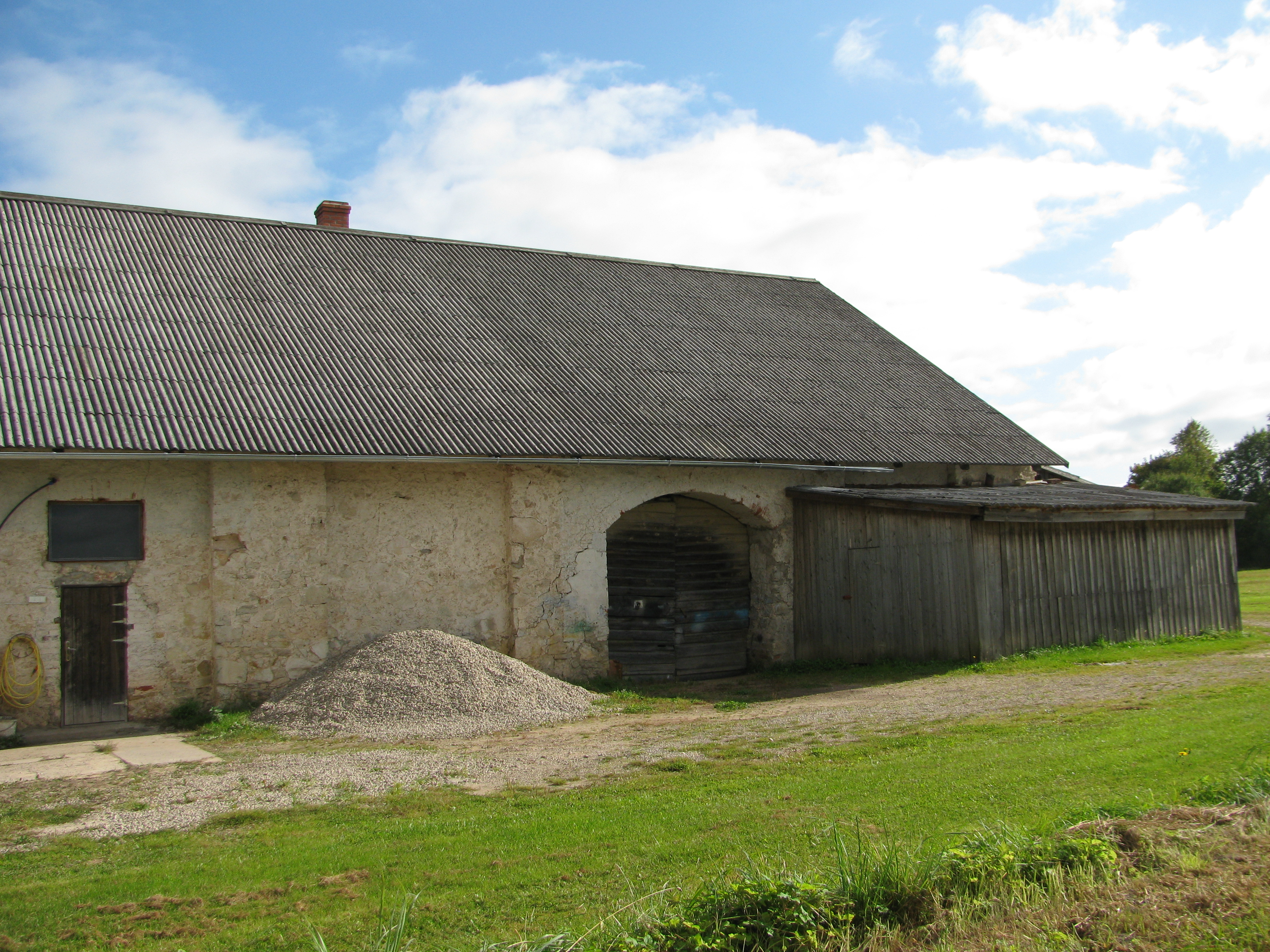 Līzespasta krogs, Līzespasts